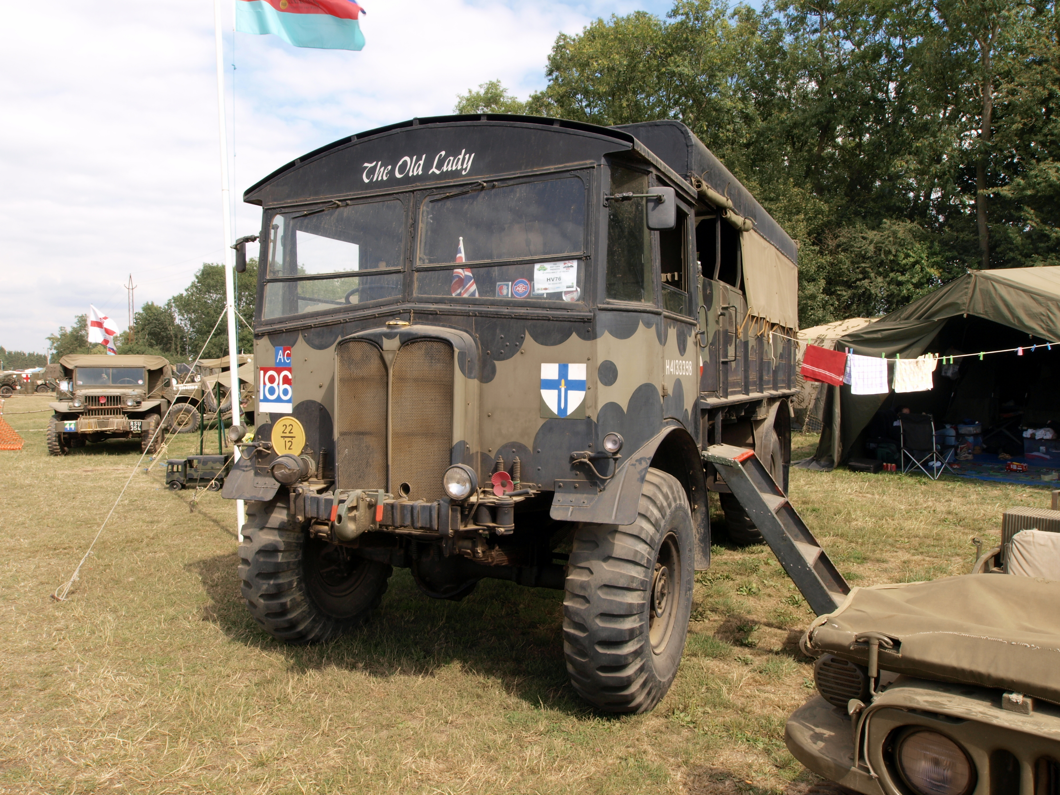 AEC Matador, H4133398.